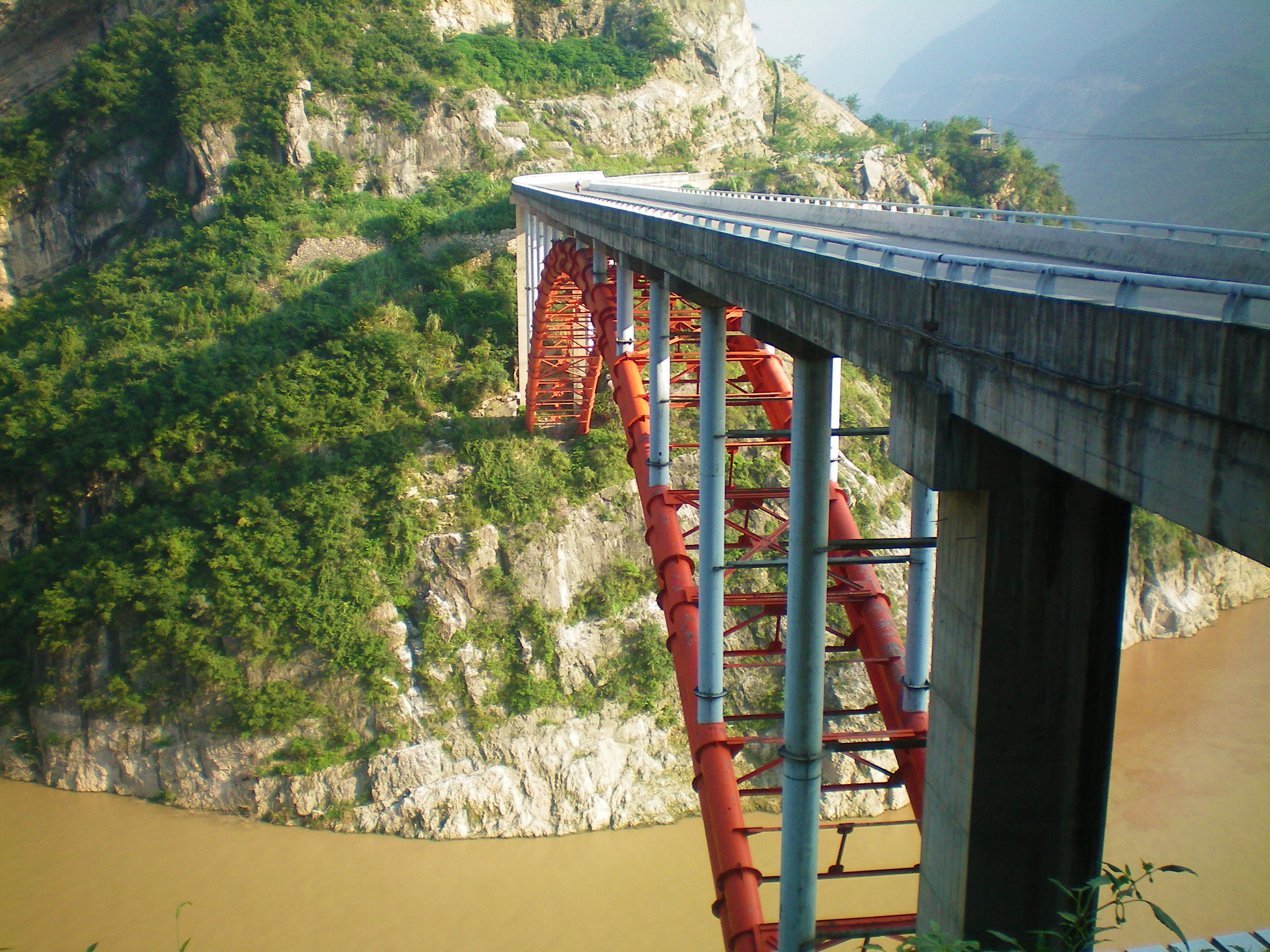 位于秭归的九畹溪大桥。